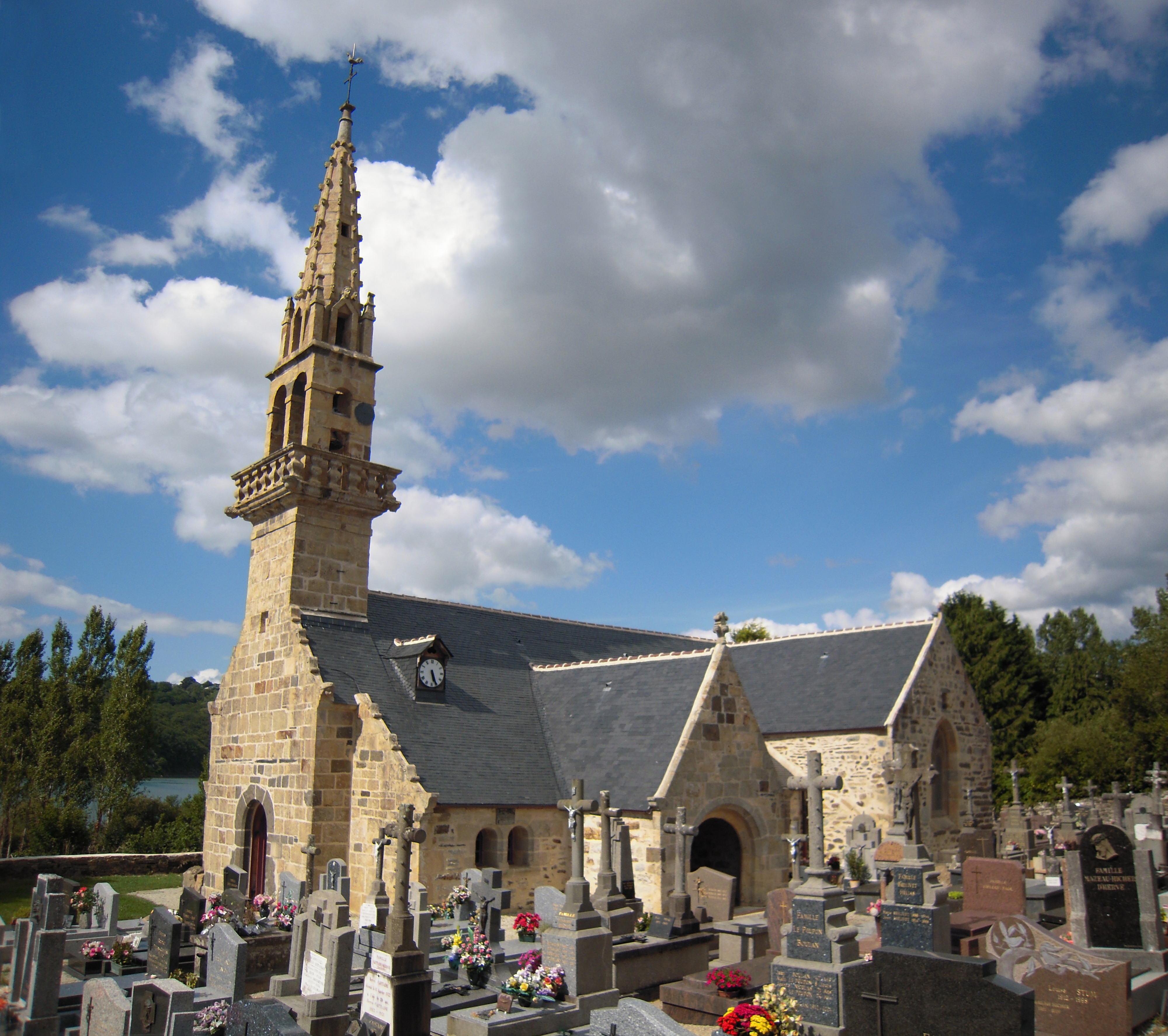 L'église de Trégarvan dans le Finistère sur les bords de l'Aulne Maritime.